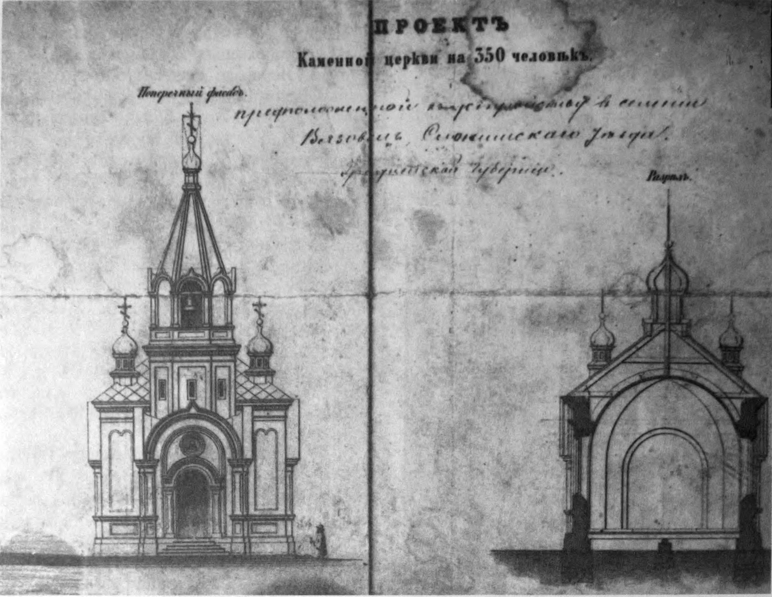 Беларуская (тарашкевіца): Вязавец (Viazaviec). Царква-мураўёўка, праект